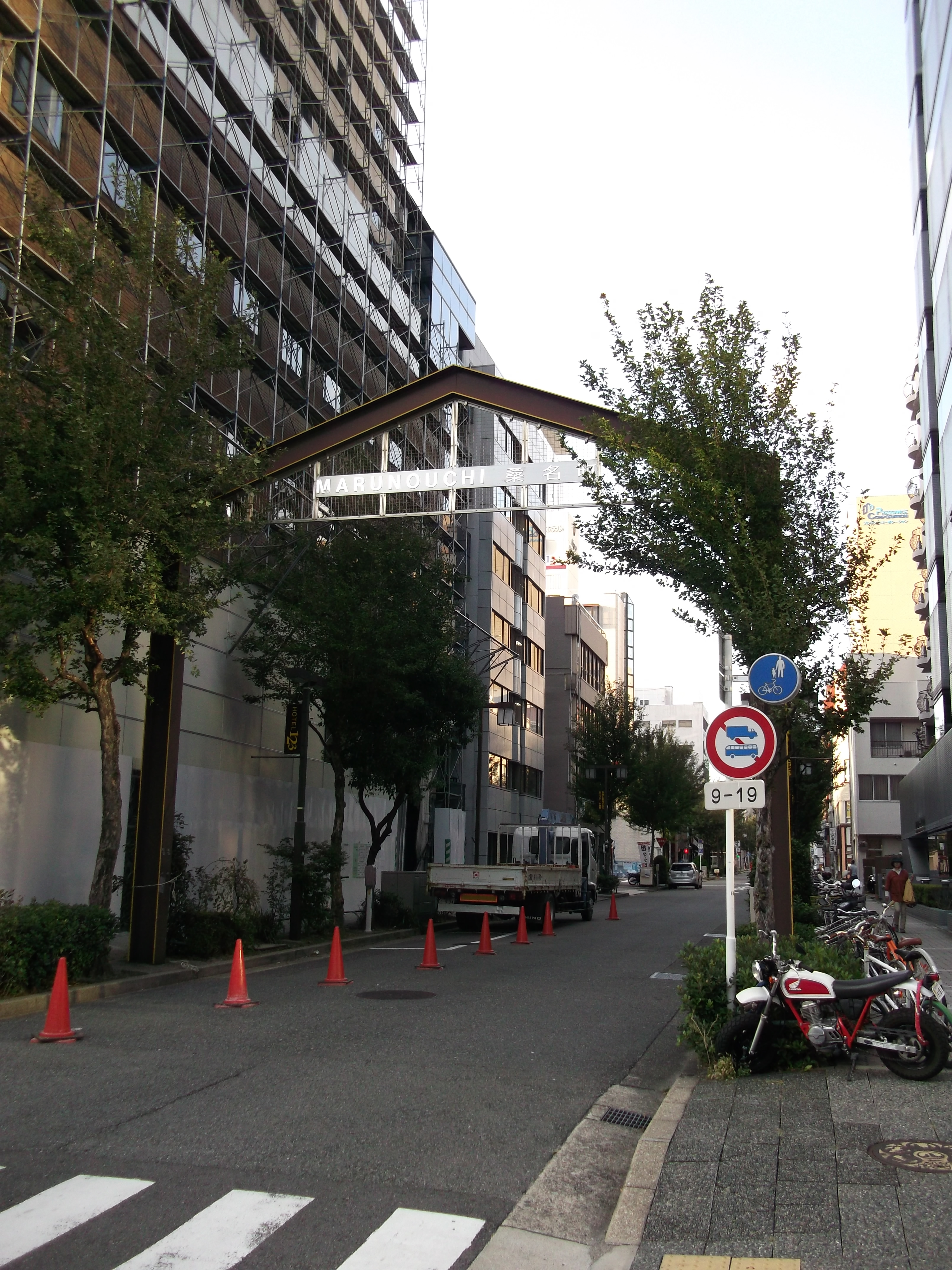 名古屋市中区丸の内の「桑名町通」を示す看板を南側公道東側より撮影